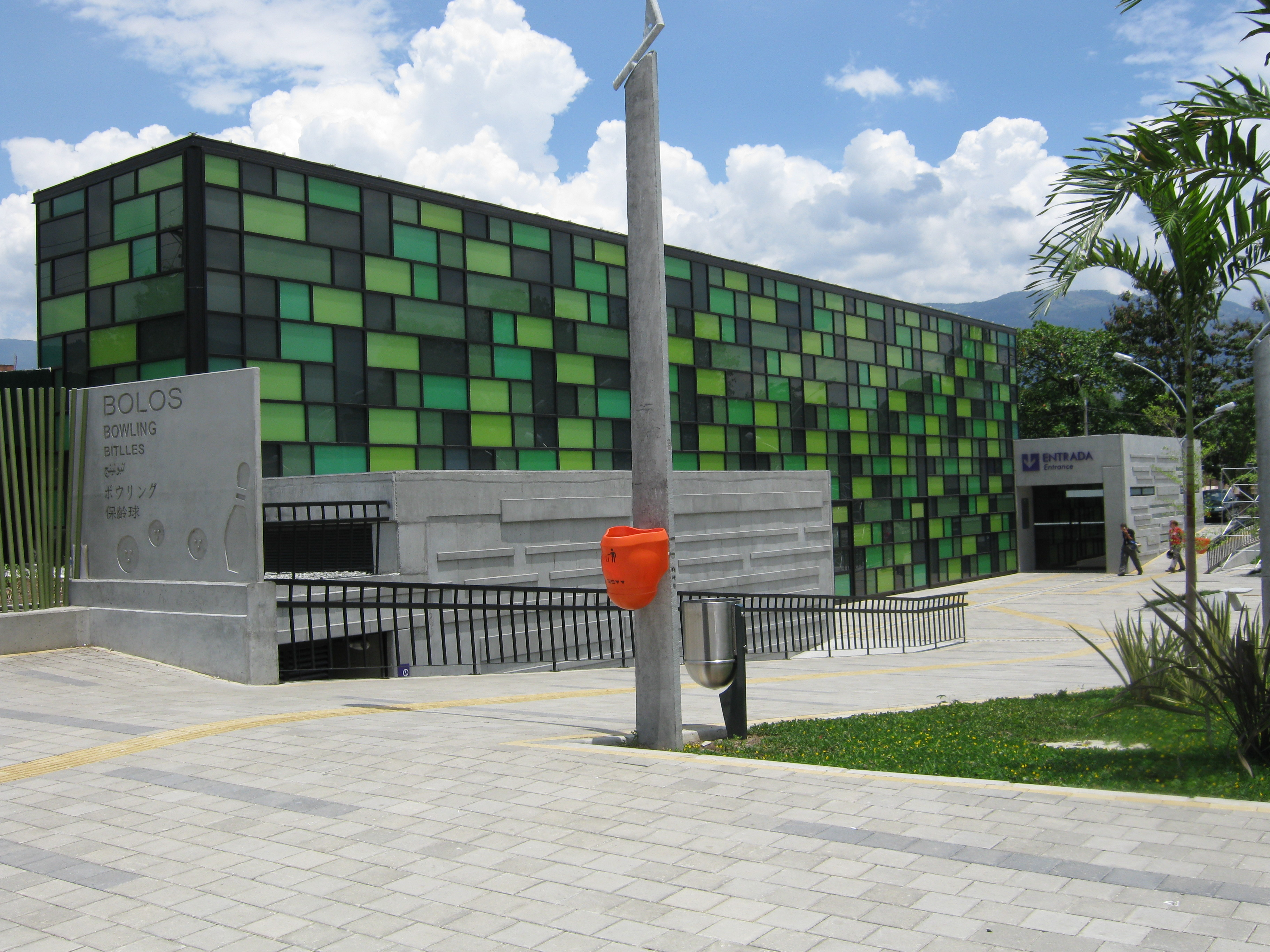 Bolera Municipal de Medellín, Unidad deportiva de Belén, Medellín, Colombia.